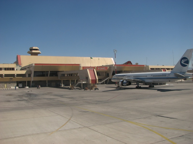 Ashgabat Airport. Аэропорт Ашгабата